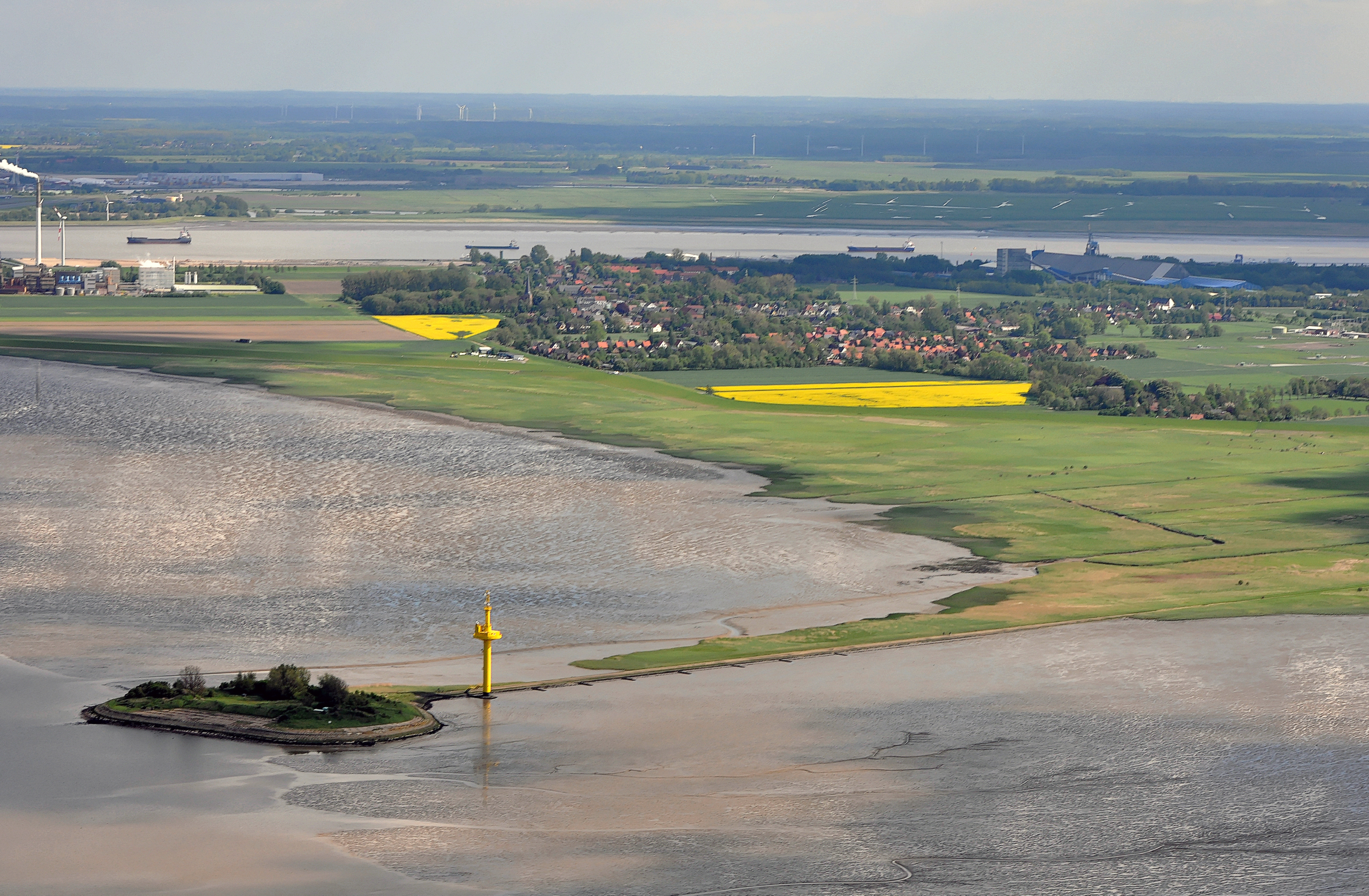 Luftbilder von der Nordseeküste 2012-05: Langlütjen I